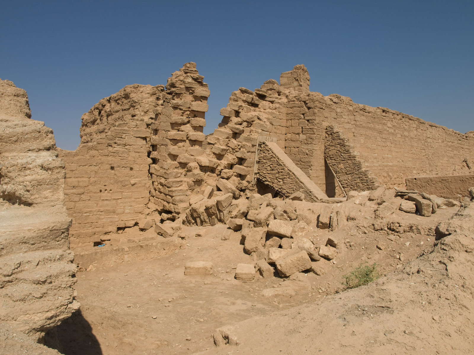 Mur d'enceinte effondré suite aux travaux poliorcétiques sassanide du siège de 256.